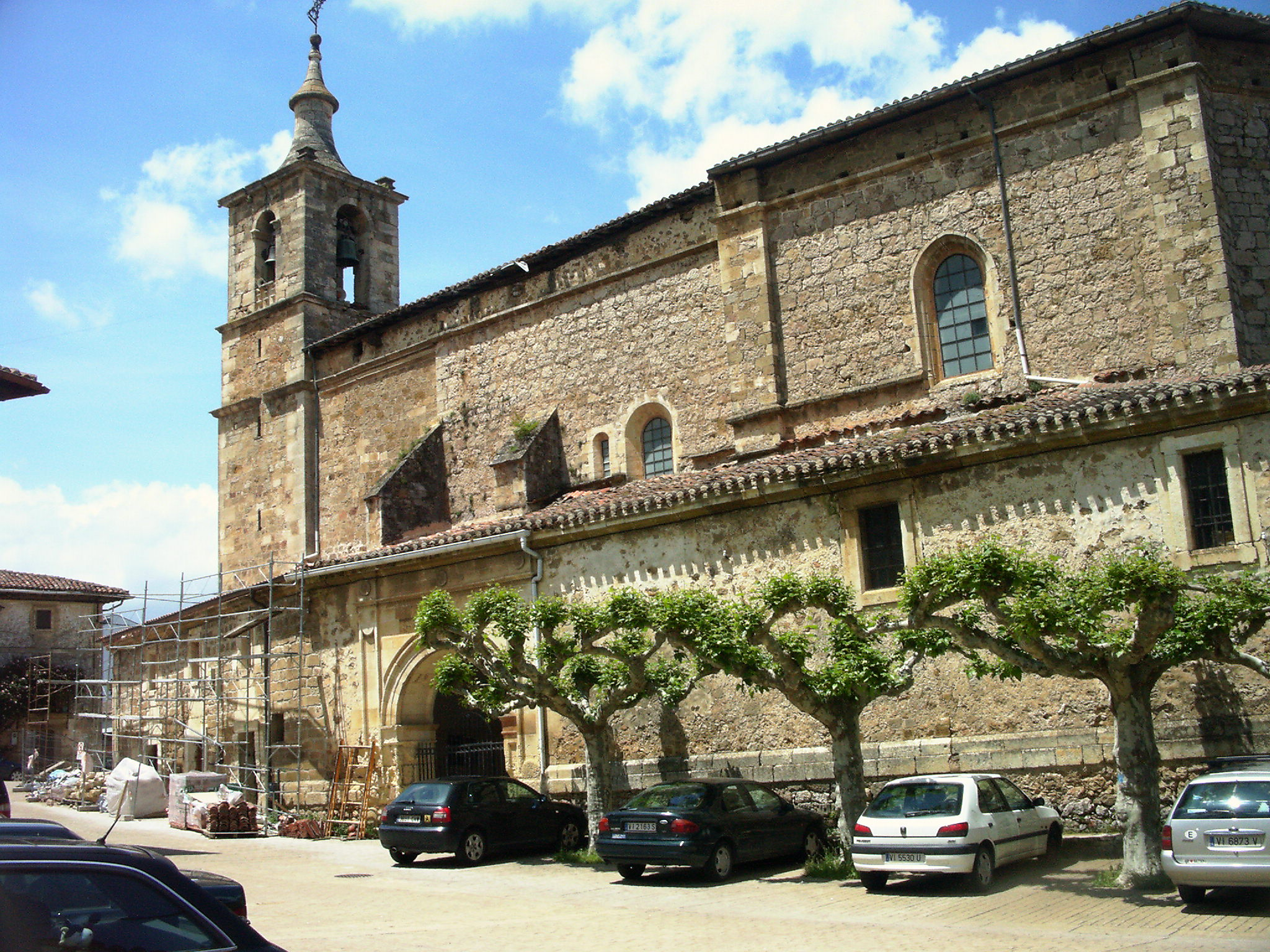 Bernedoko eliza